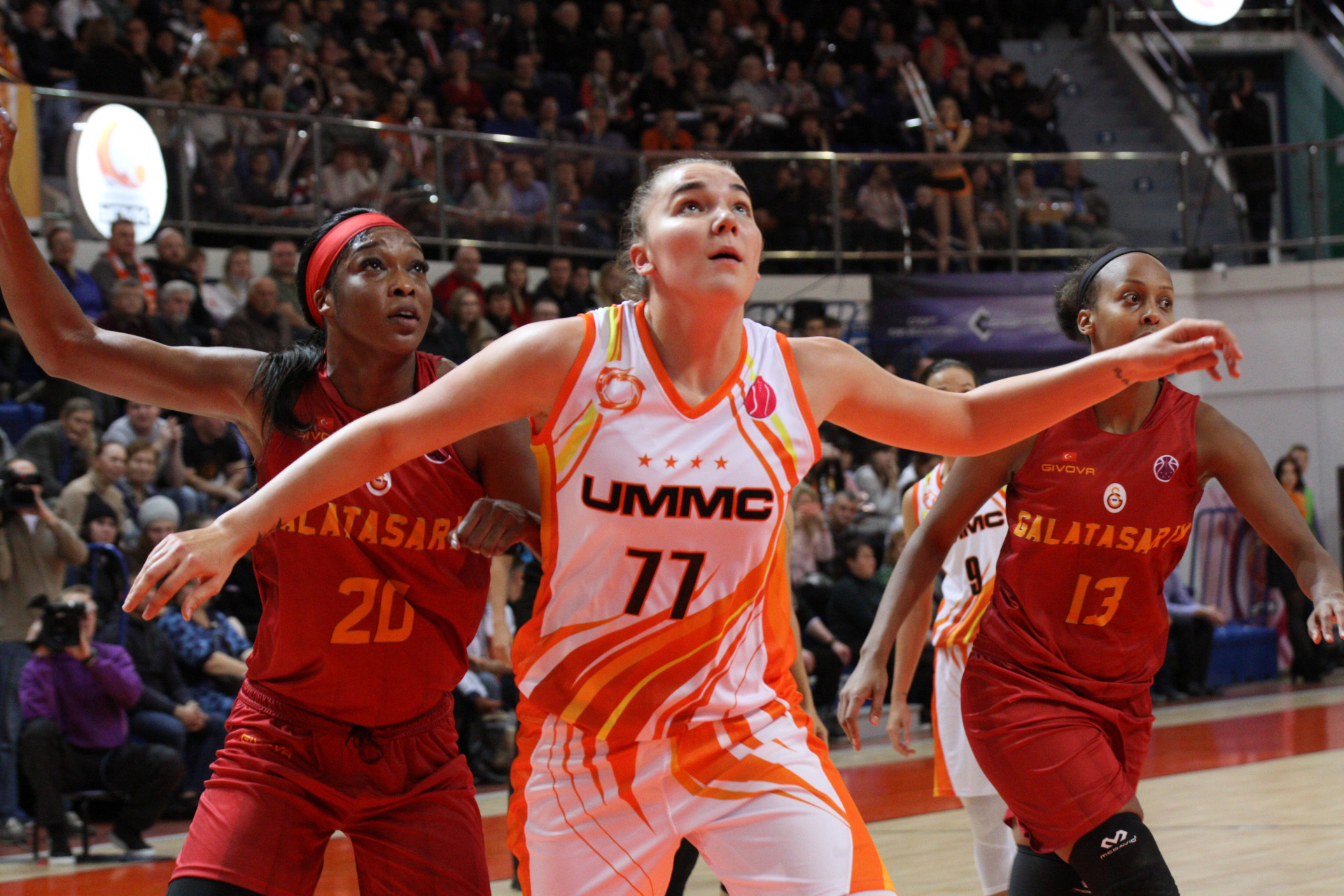 УГМК против Галатасарай Суперкубок Европы 2018